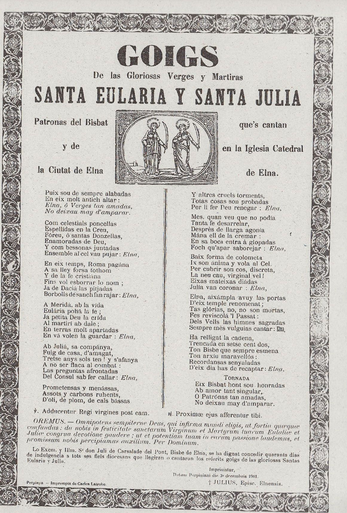 Goigs de la Cathédrale Sainte-Eulalie-et-Sainte-Julie d'Elne (1901)